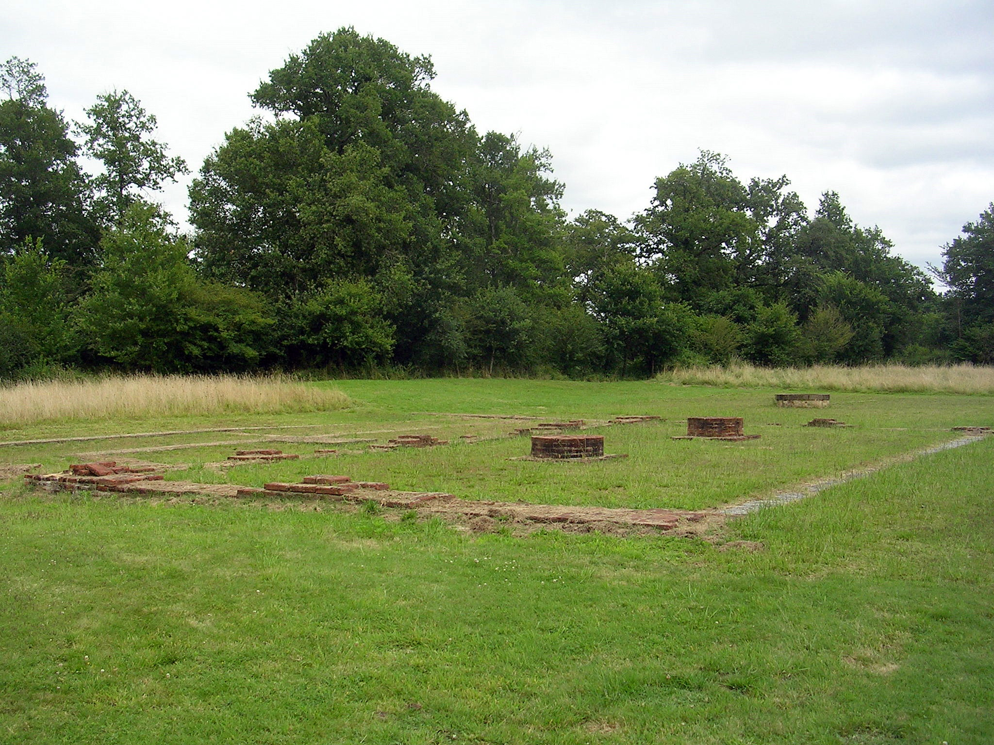 Vestige du château de Labrit